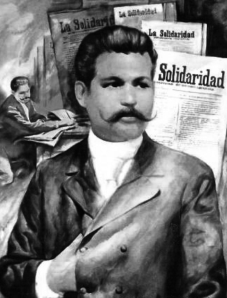 Marcelo H. del Pilar